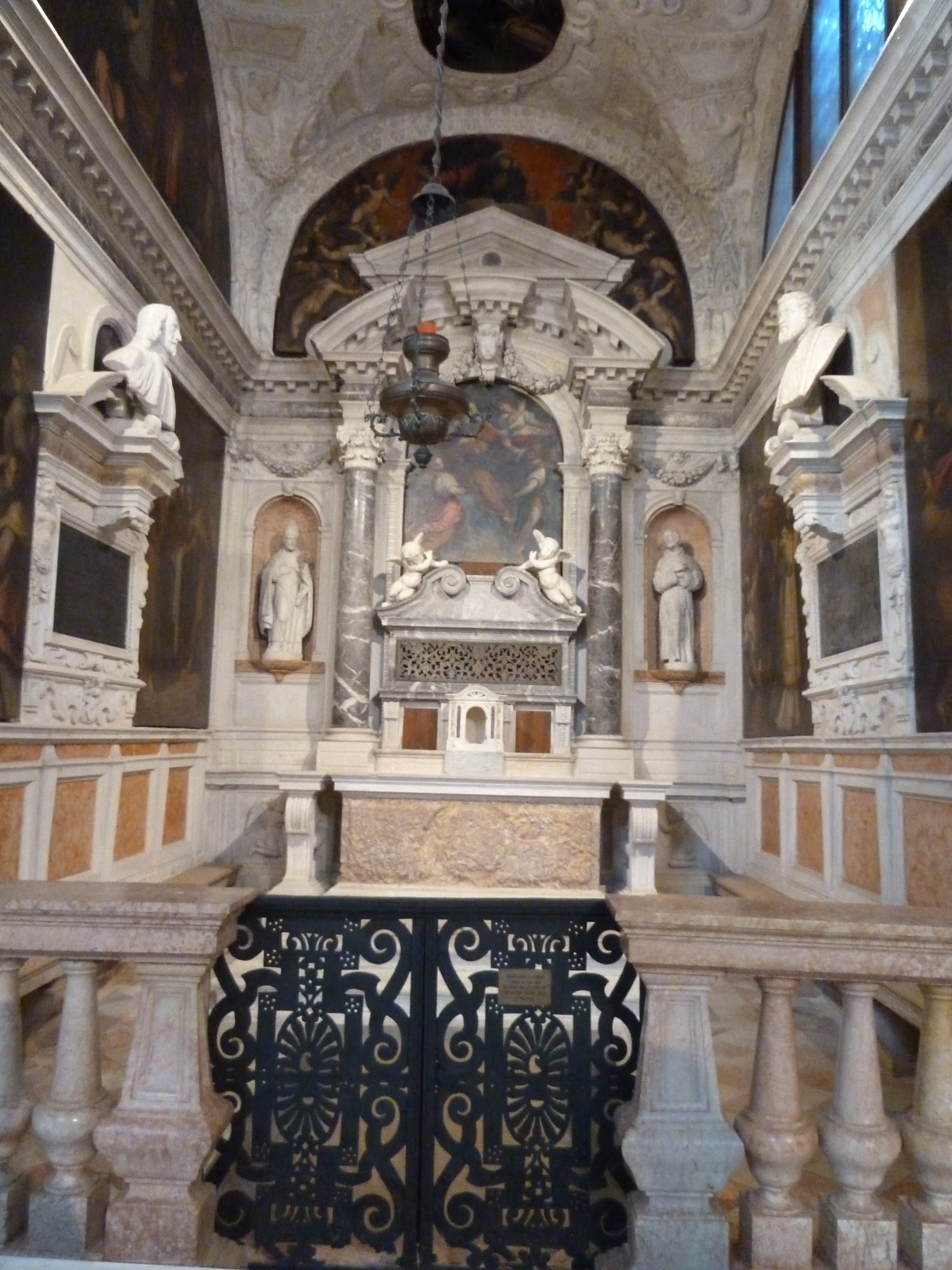 Sant'Antonin (Venice)